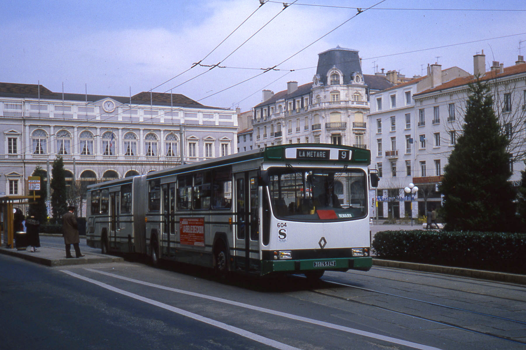 Un Renault PR180 à Saint-Étienne en 1982.